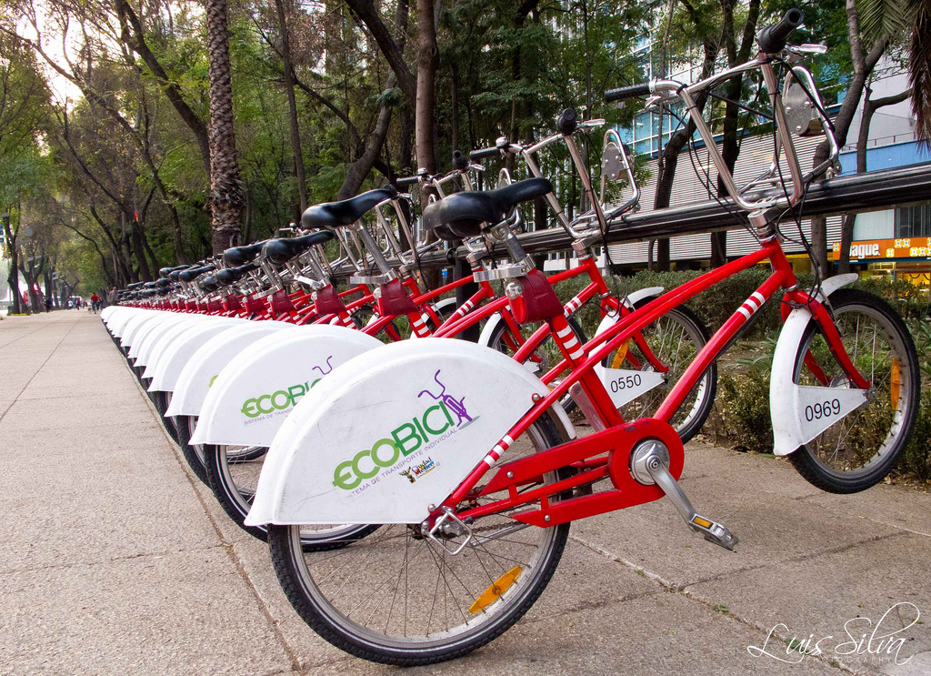 Módulo de Ecobici ubicado en Paseo de la Reforma en la Ciudad de México Mexico City